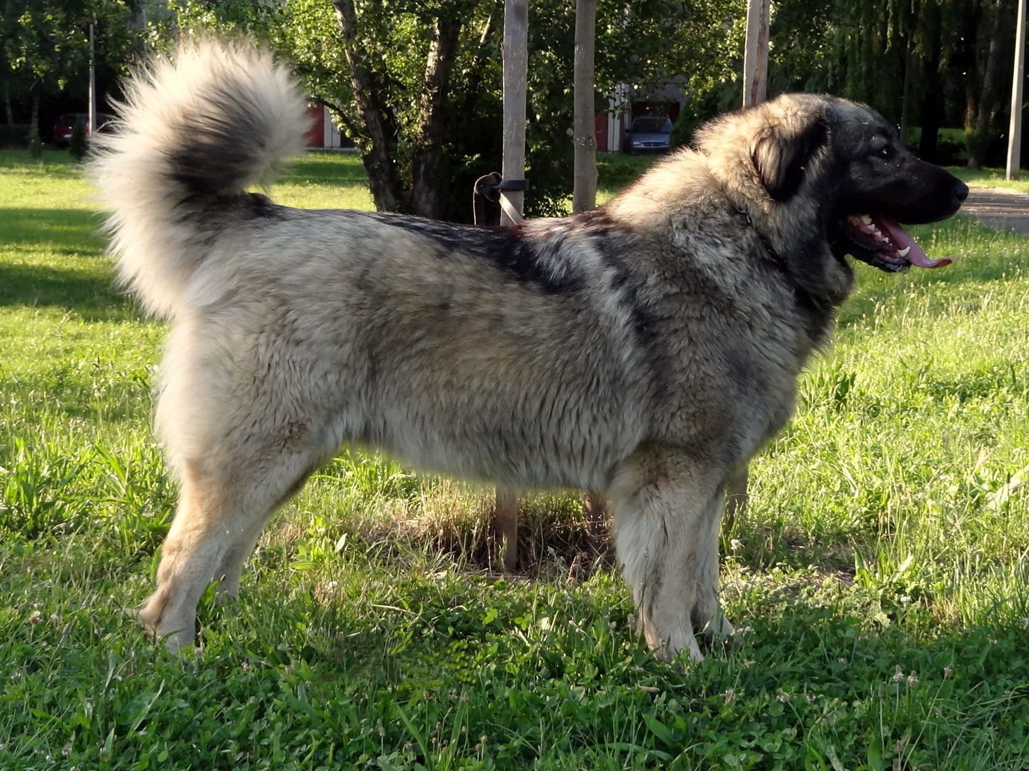 Sarplaninac szuka, 2 éves, Római Mandula Kennel